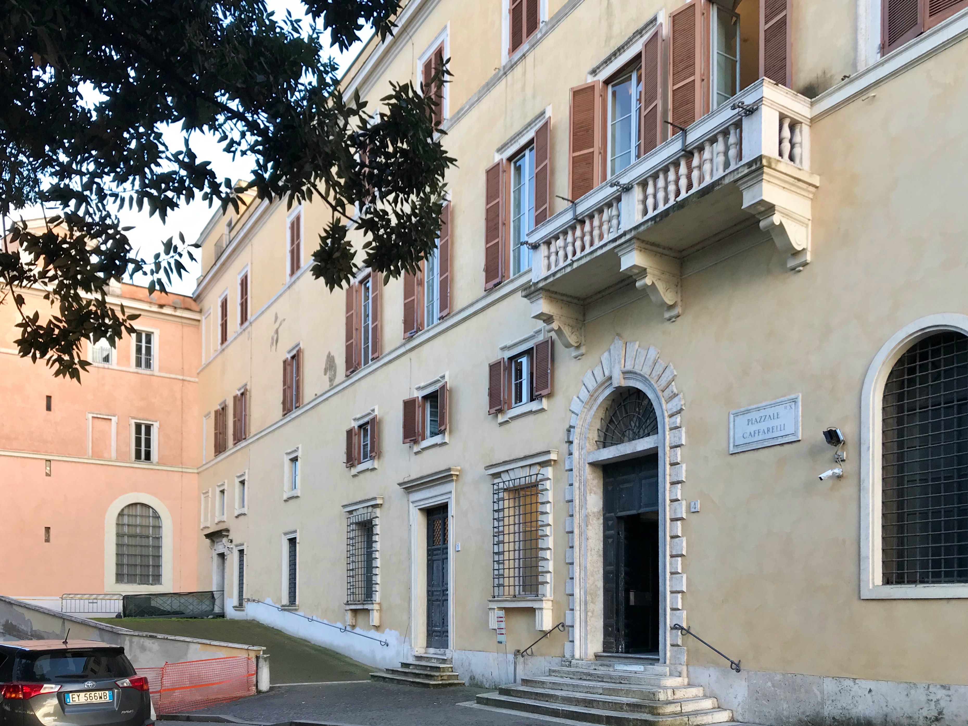 Palazzo Caffarelli in Rome